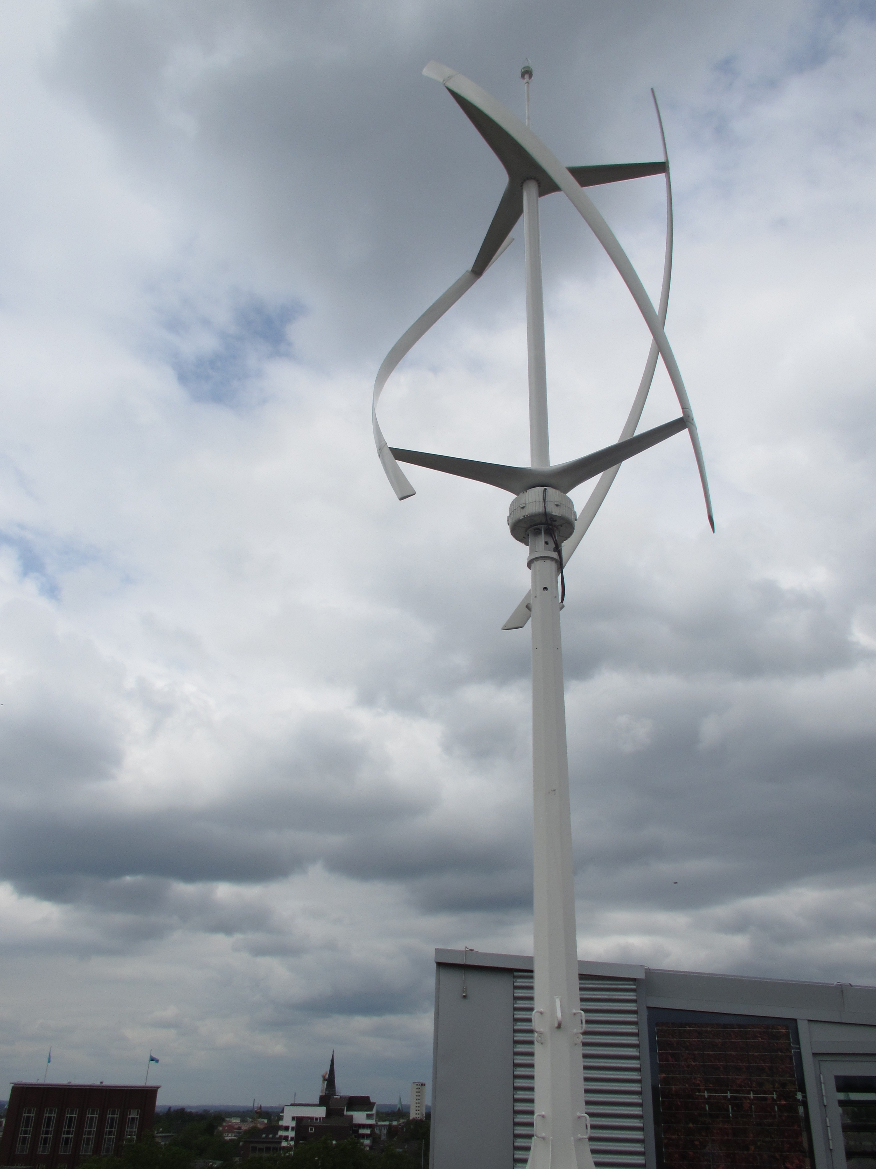 GLS Bank, Christstraße 9, 44789 Bochum, Windgenerator (Kleinwindenergieanlage) auf dem Dach des Erweiterungsbaus